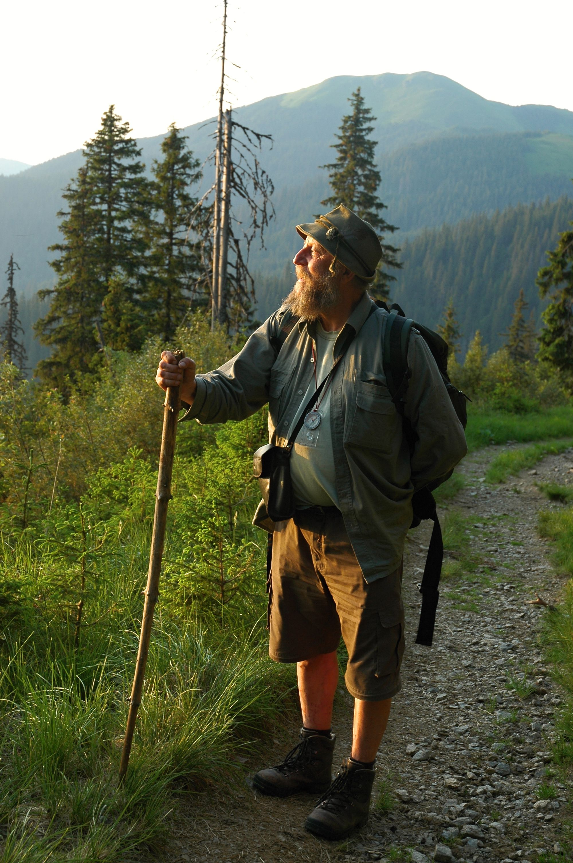 Jan Lacina pod vrcholem Pop Ivana